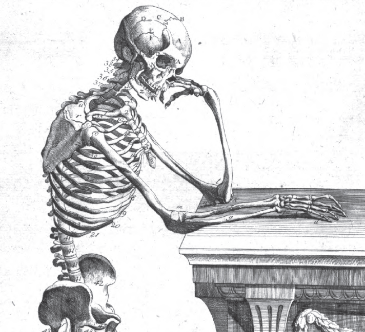 Ausschnitt aus Abb. 2 in Riedels Abbildung der Knochen und Muskeln des menschlichen Körpers für junge Künstler, nebst deutsch-latein- und französischen Namen aller Theile und ihrer kurzen Erklärung